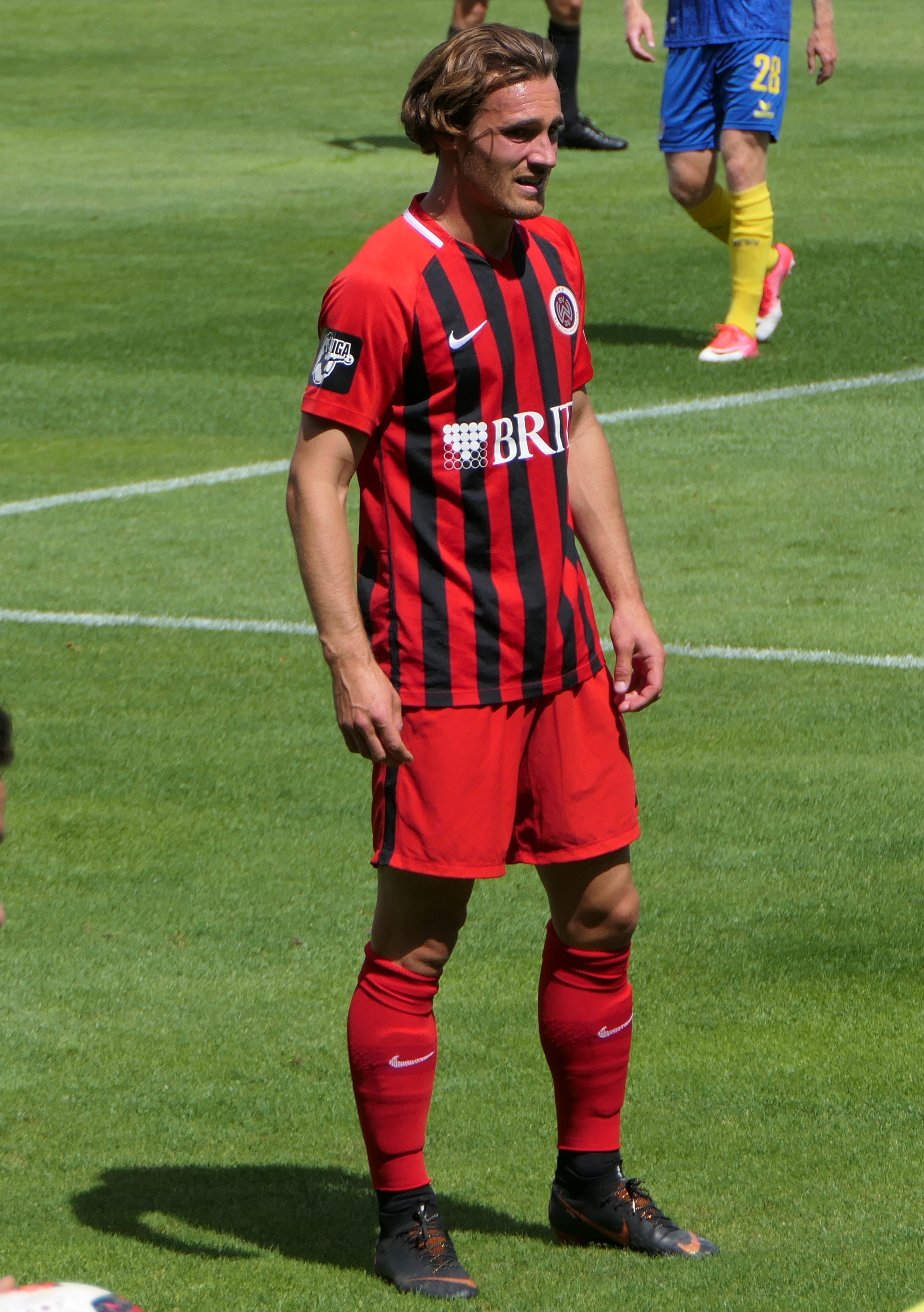 Der Fussballprofi Jules Schwadorf im Trikot von Wehen Wiesbaden beim Heimspiel gegen Eintracht Braunschweig am 11.08.2018.